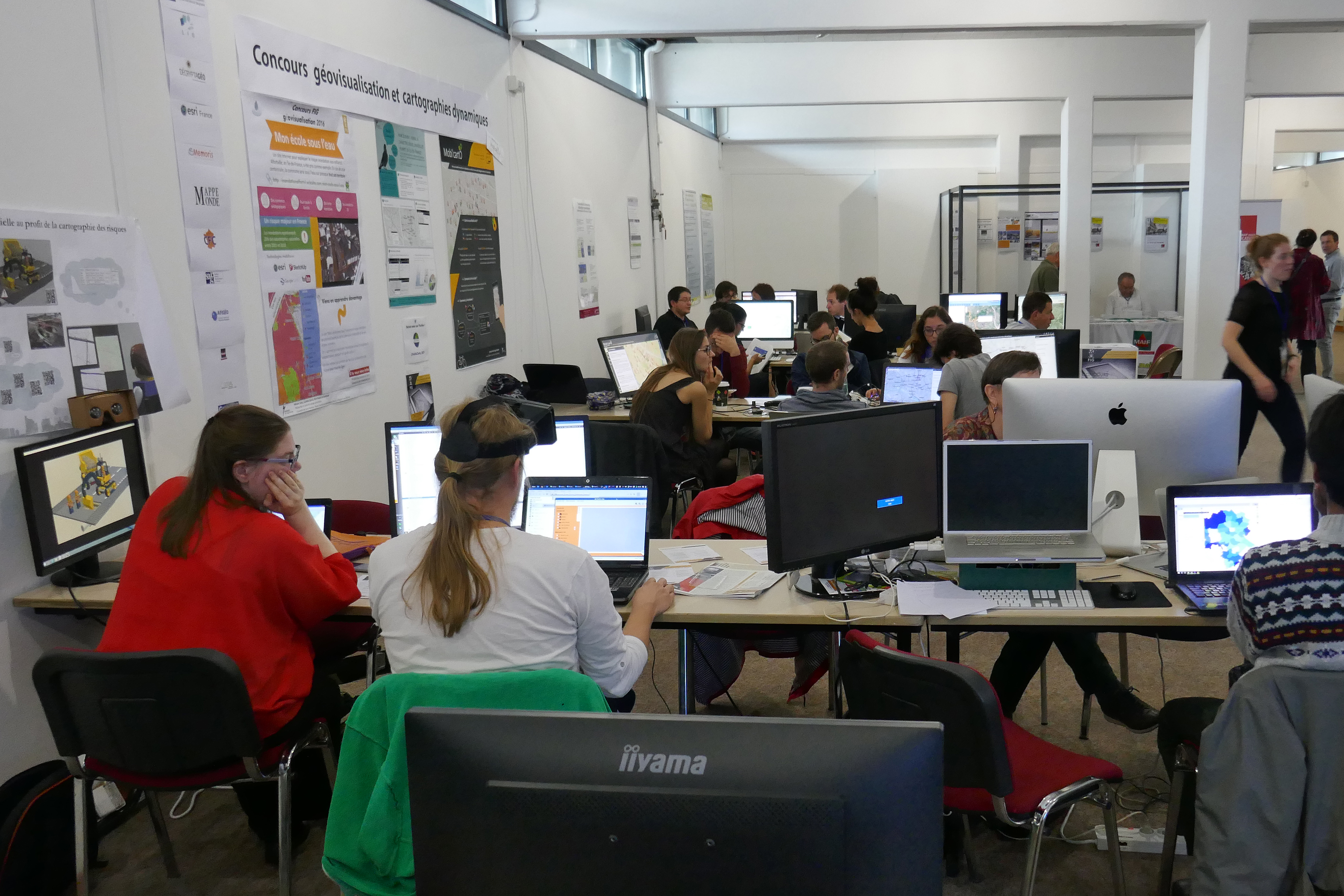 9e concours de géovisualisation et cartographies dynamiques au Salon de la Géomatique dans le cadre du Festival international de géographie (FIG) de Saint-Dié-des-Vosges.